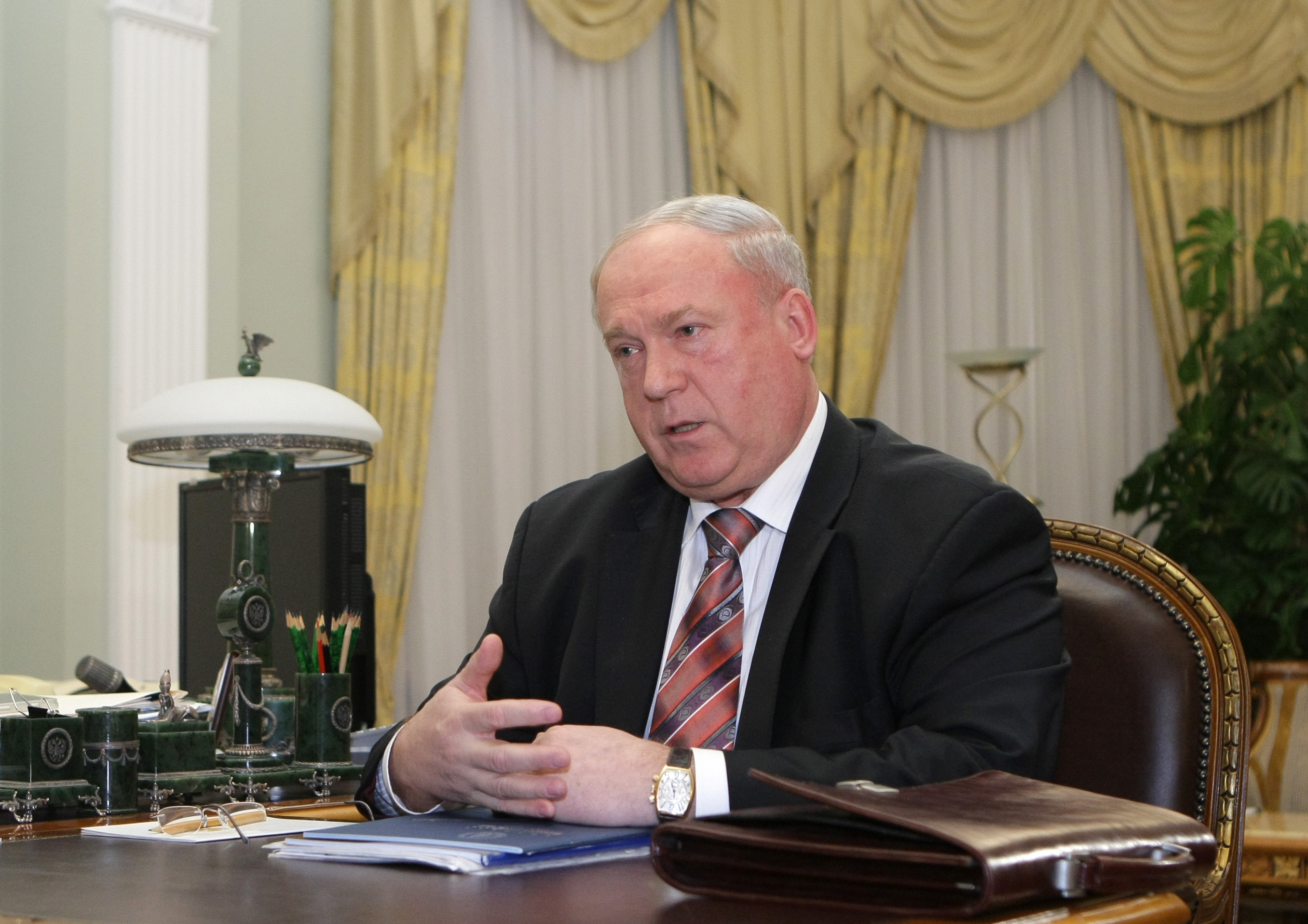 Генеральный директор ОАО «Ижевский машзавод» В.П.Гродецкий на встрече с Председателем Правительства Российской Федерации В.В.Путиным.